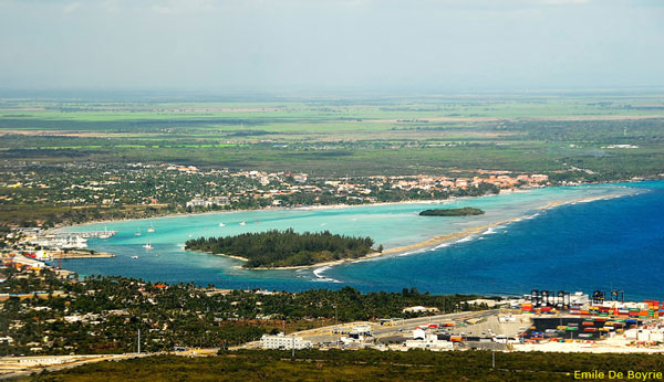 vista aerea della baia di Boca Chica